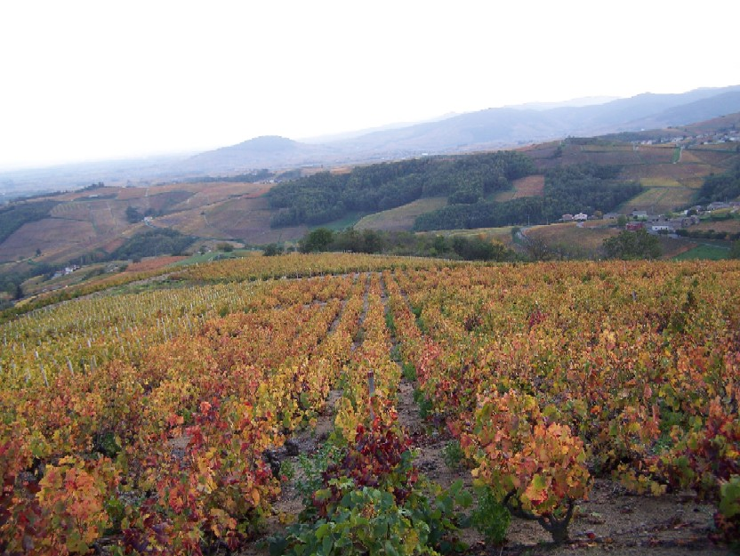 Vignobles du Beaujolais vers Avenas dans le département français du Rhône.